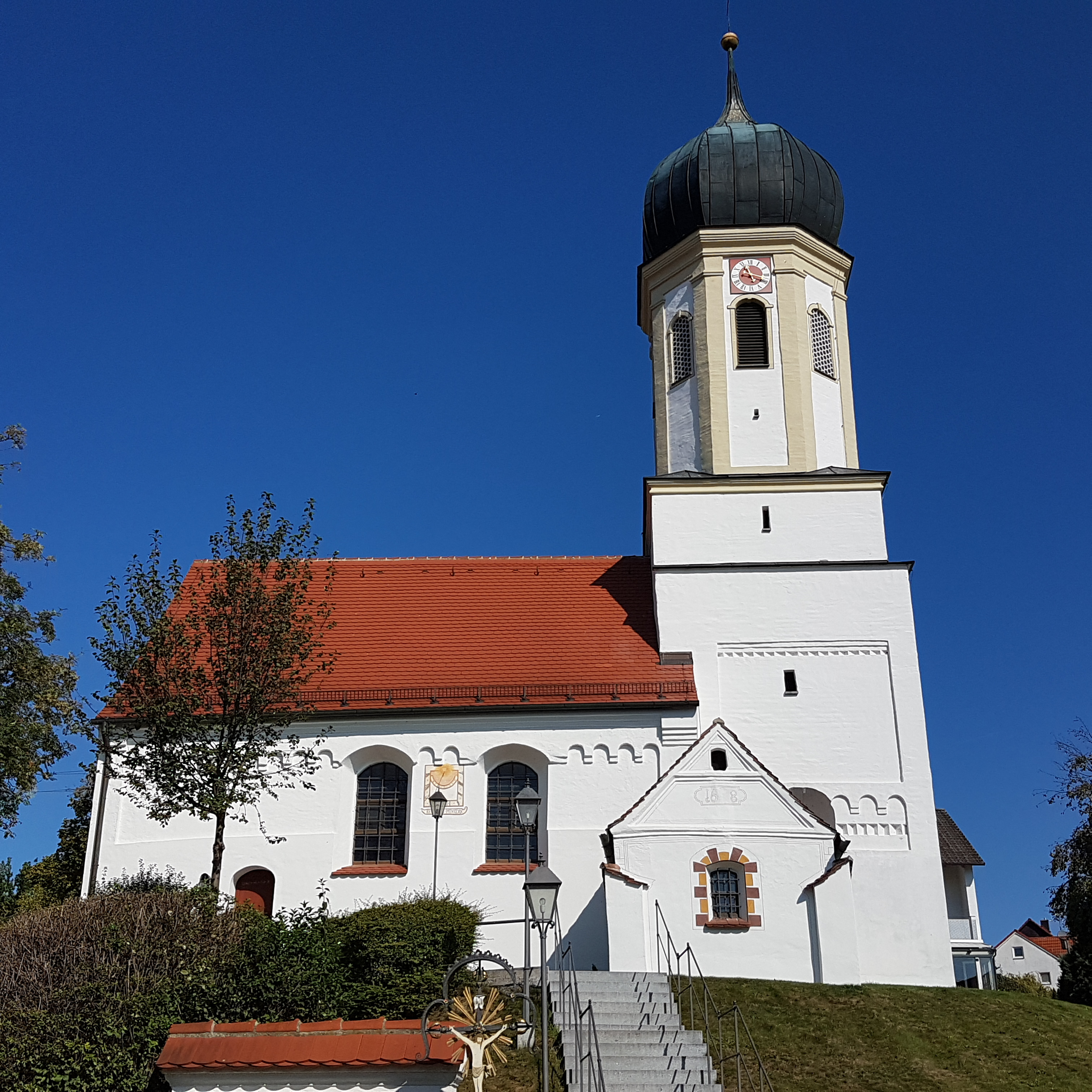 Tegernbach (Mittelstetten), Kirche